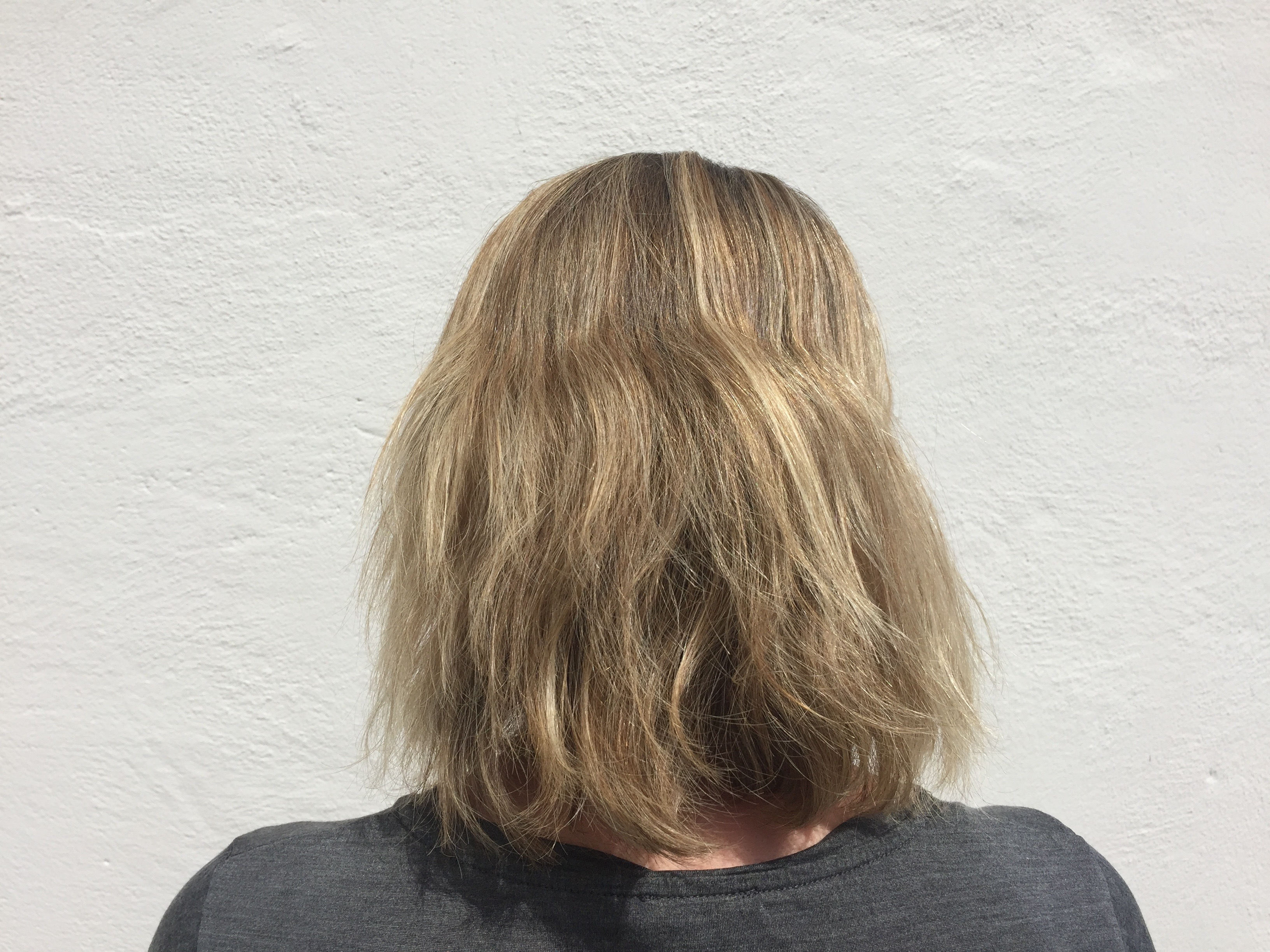 Elisabeth Botterli i Forfatterne bak